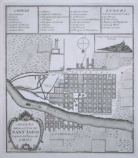 Pianta della Citta di Sant'Iago Capitale del regno del Chili. Atlante dell'America contenente le Migliori carte geografiche.